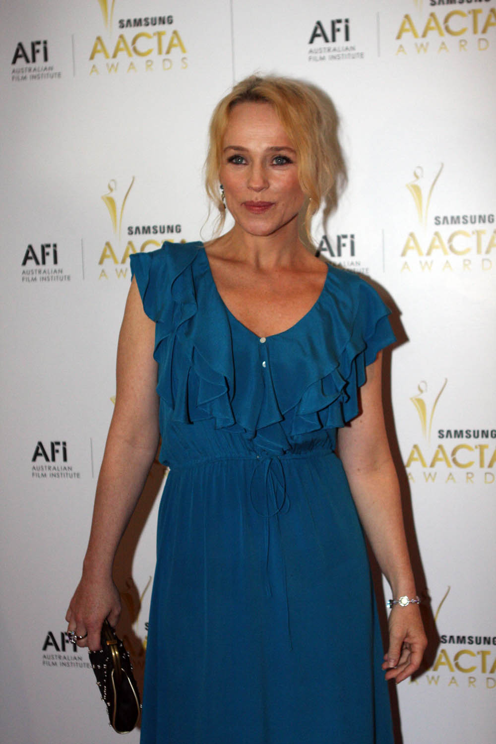 Susie Porter, AACTA Awards